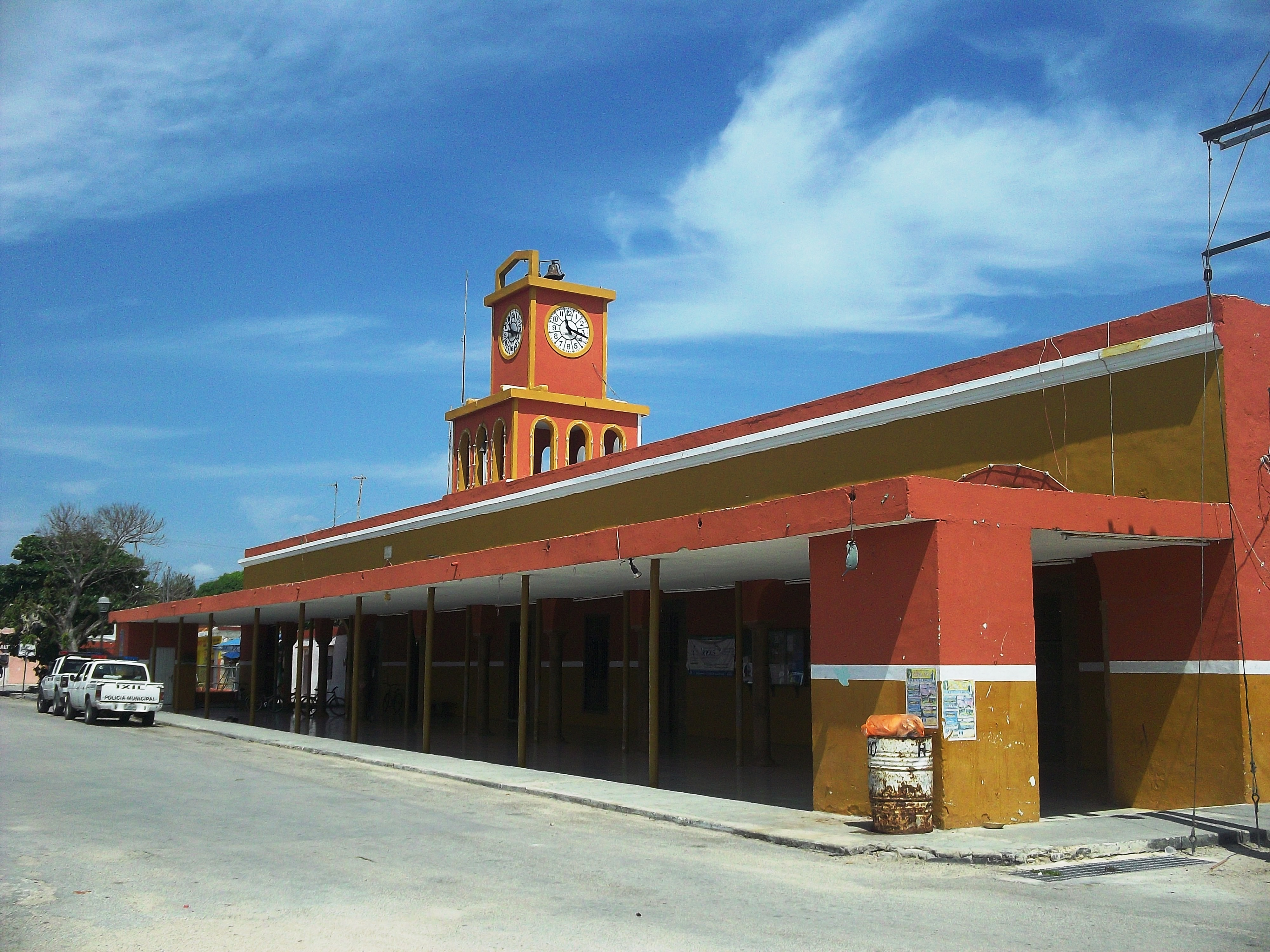 Palacio municipal de Ixil, Yucatán.